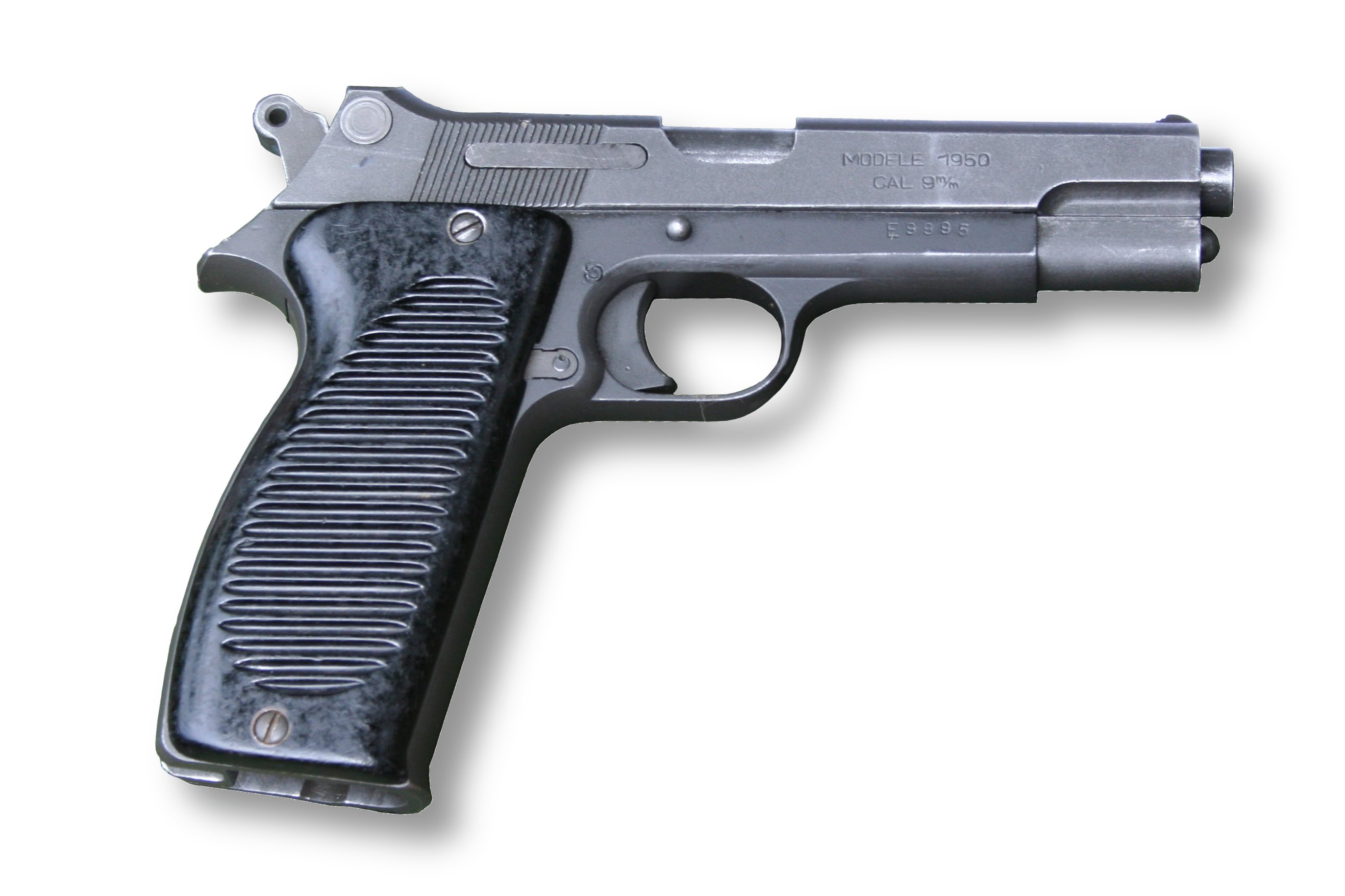 PAMAC